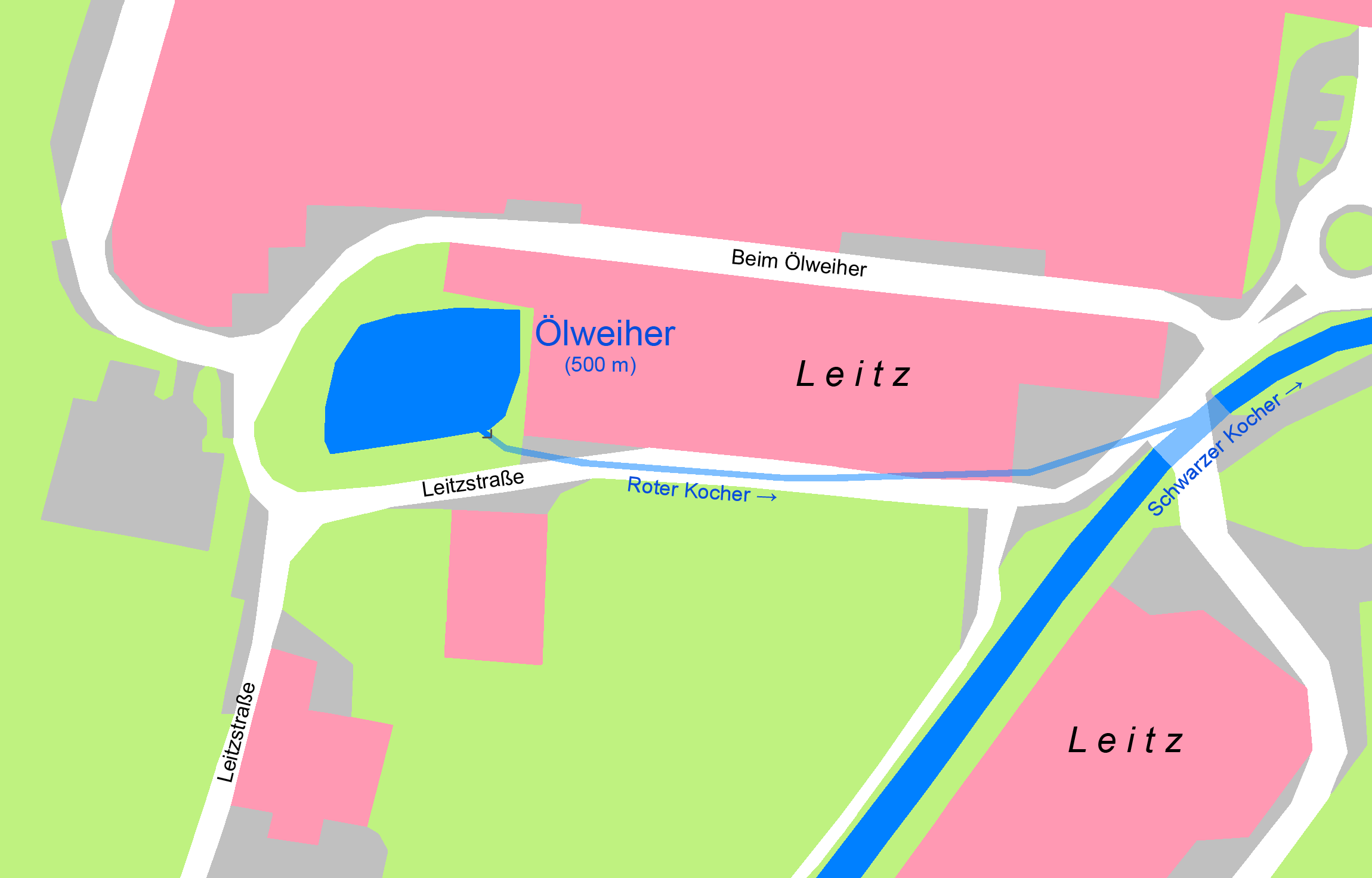 Ölweiher und ungefährer Lauf des Roten Kochers in Oberkochen, Baden-Württemberg Gebäude Siedlungsfläche Wald und Grünfläche Straße Gewässer